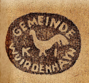 Altes Dorfsiegel von Würdenhain aus dem 18./ 19. Jahrhundert.